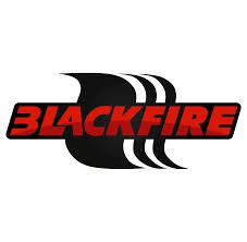 Logo Blackfire